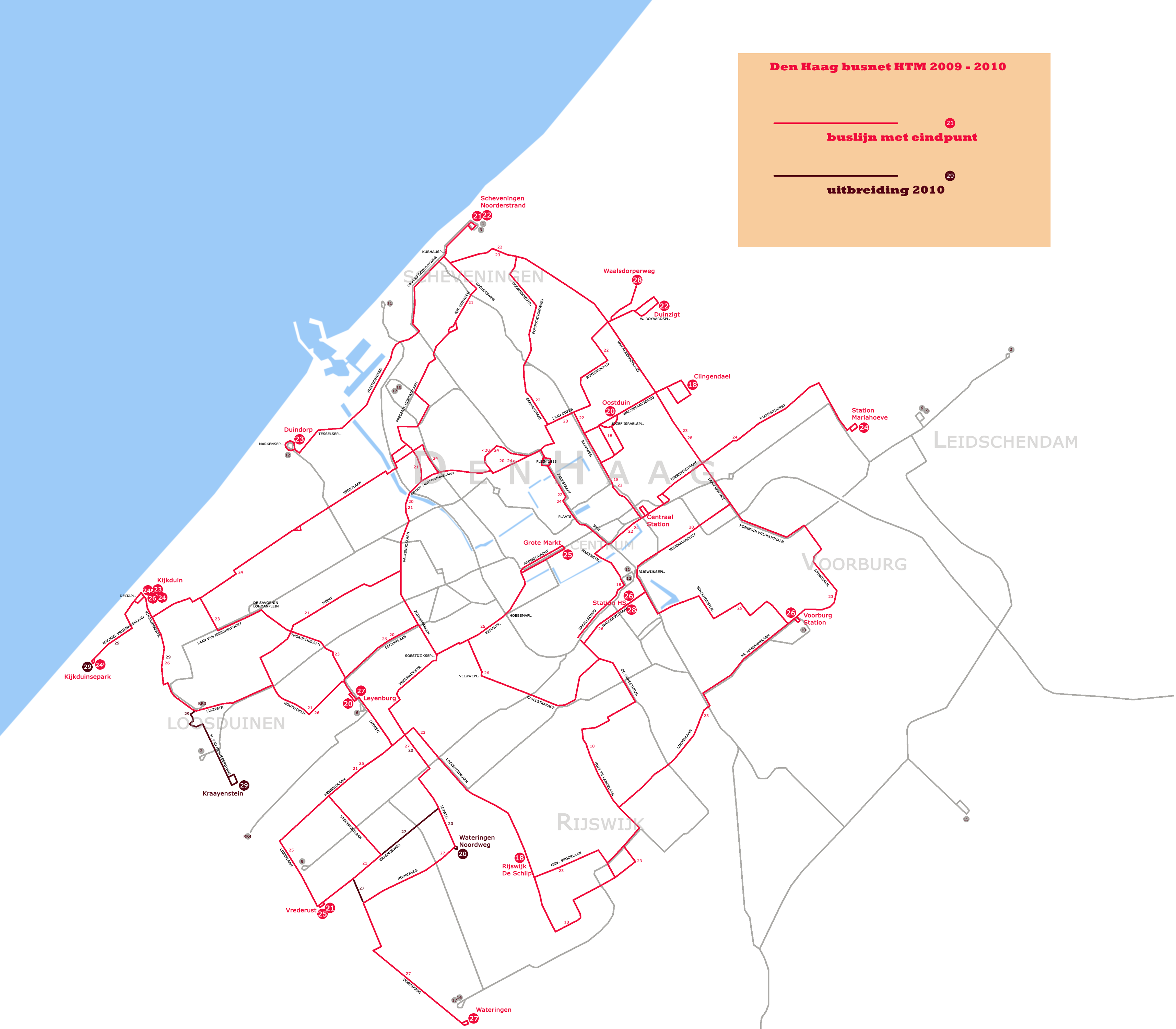 Busnet Den Haag 2009/10